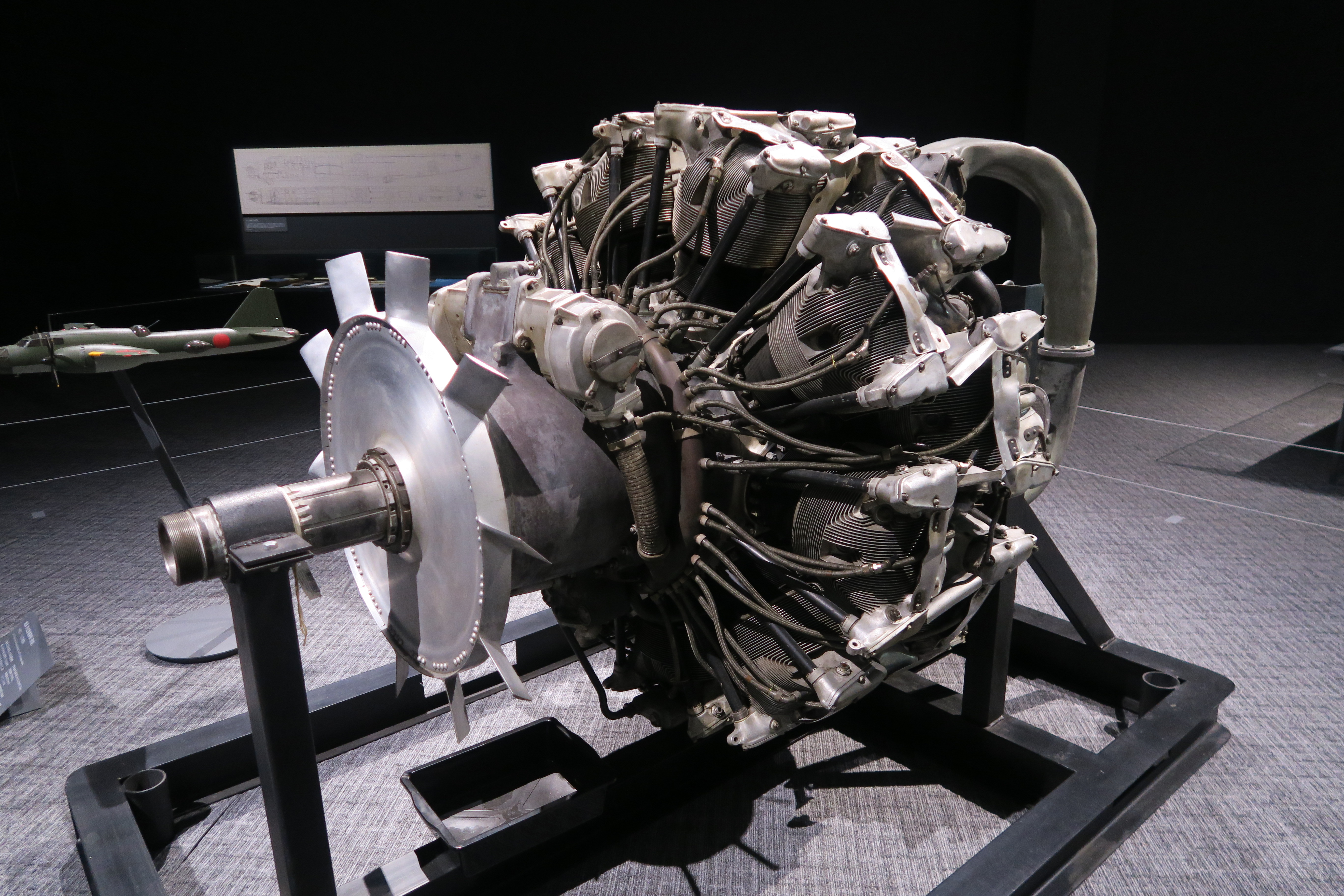 三菱 ハ42（ハ214）エンジン。ハ104を基に再設計したエンジンでキ91重爆撃機への搭載予定であったが、本機は開発中止となった。